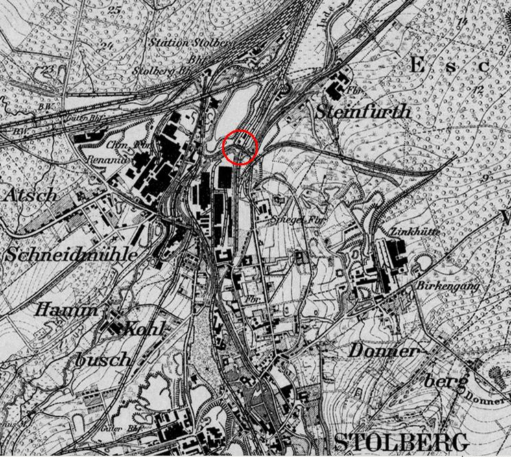 Königl.Preuß.Landesaufnahme 1893 - 1910, Stolberg Rhld., Standort Bahnhof Velau